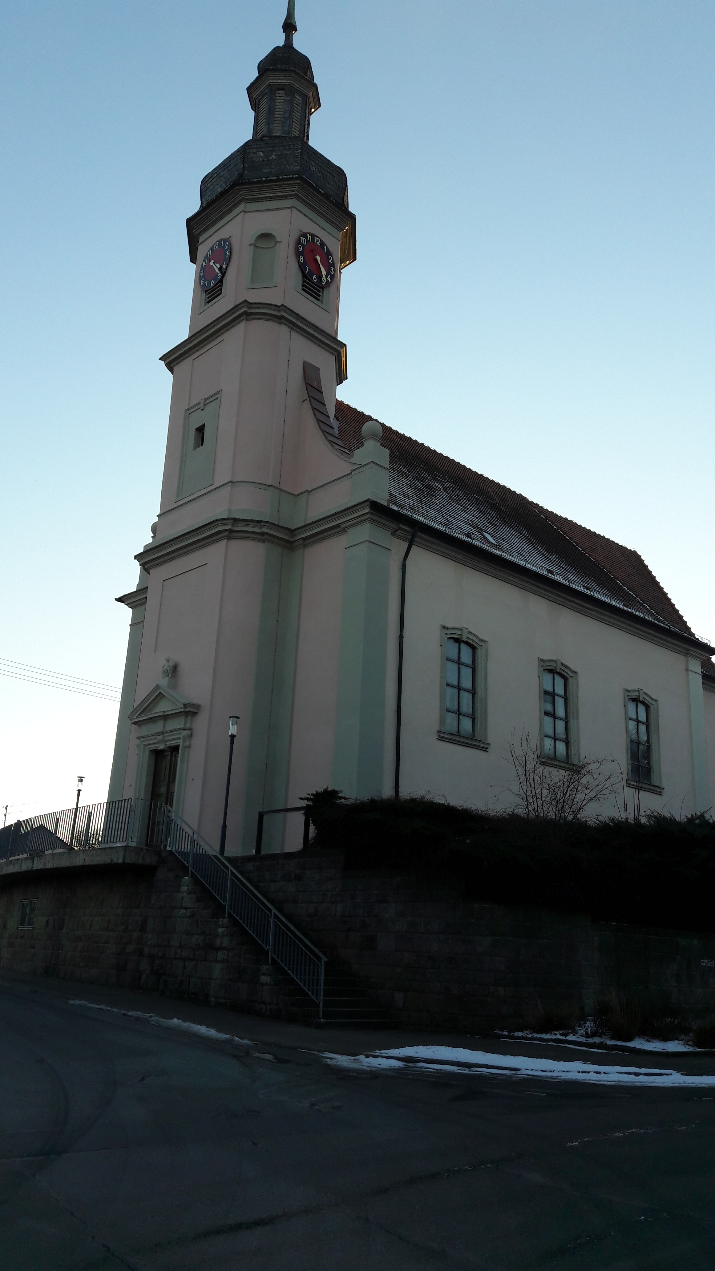 Ringstraße 22 (Oberwittighausen, 2017)